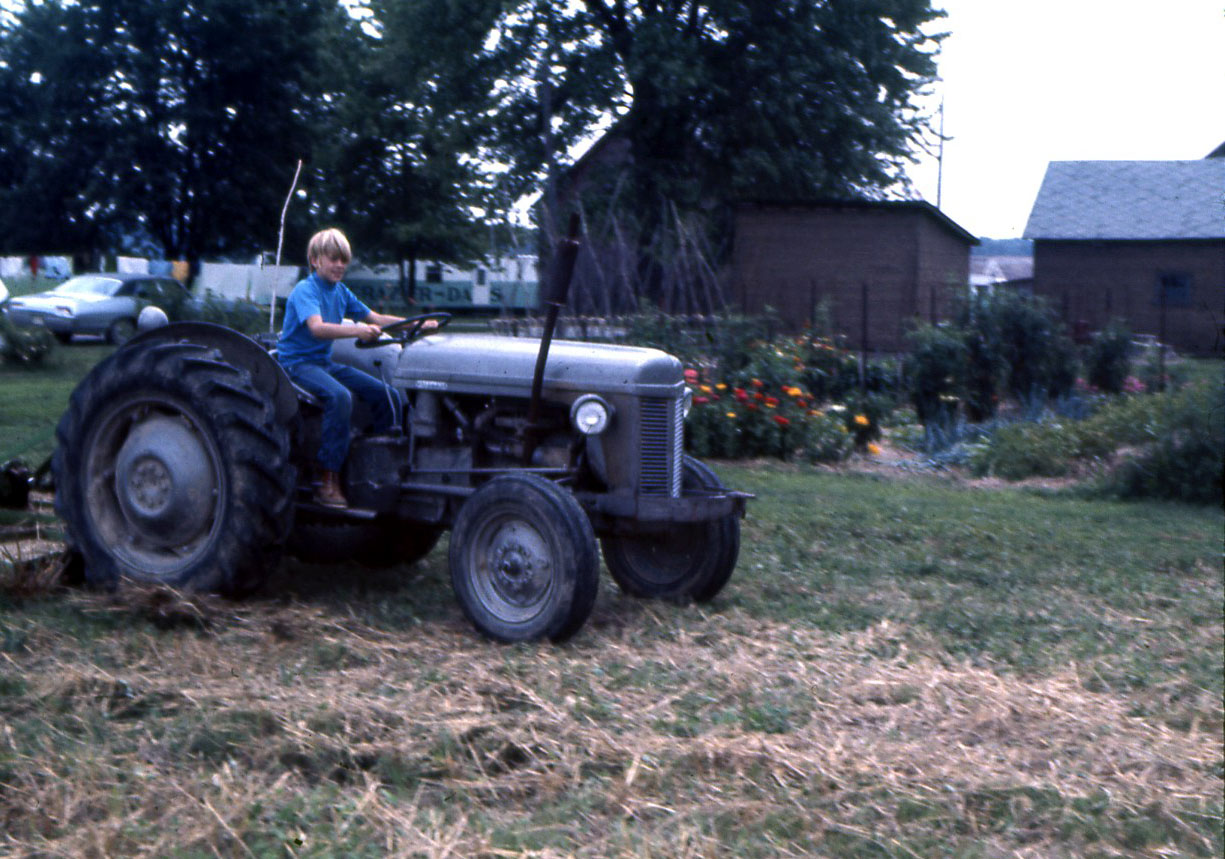 William Cameron McCool auf einem Ferguson TO-20 Traktor (Baujahr ca. 1953-57) im Garten seines Großvaters in Hoyleton Township, Washington County, Illinois Im Hintergrund sind Bauwagen zu sehen, die beim Bau der Interstate 64 benutzt wurden, die den Bauernhof seit der Eröffnung mitte der 70er Jahre durchquert